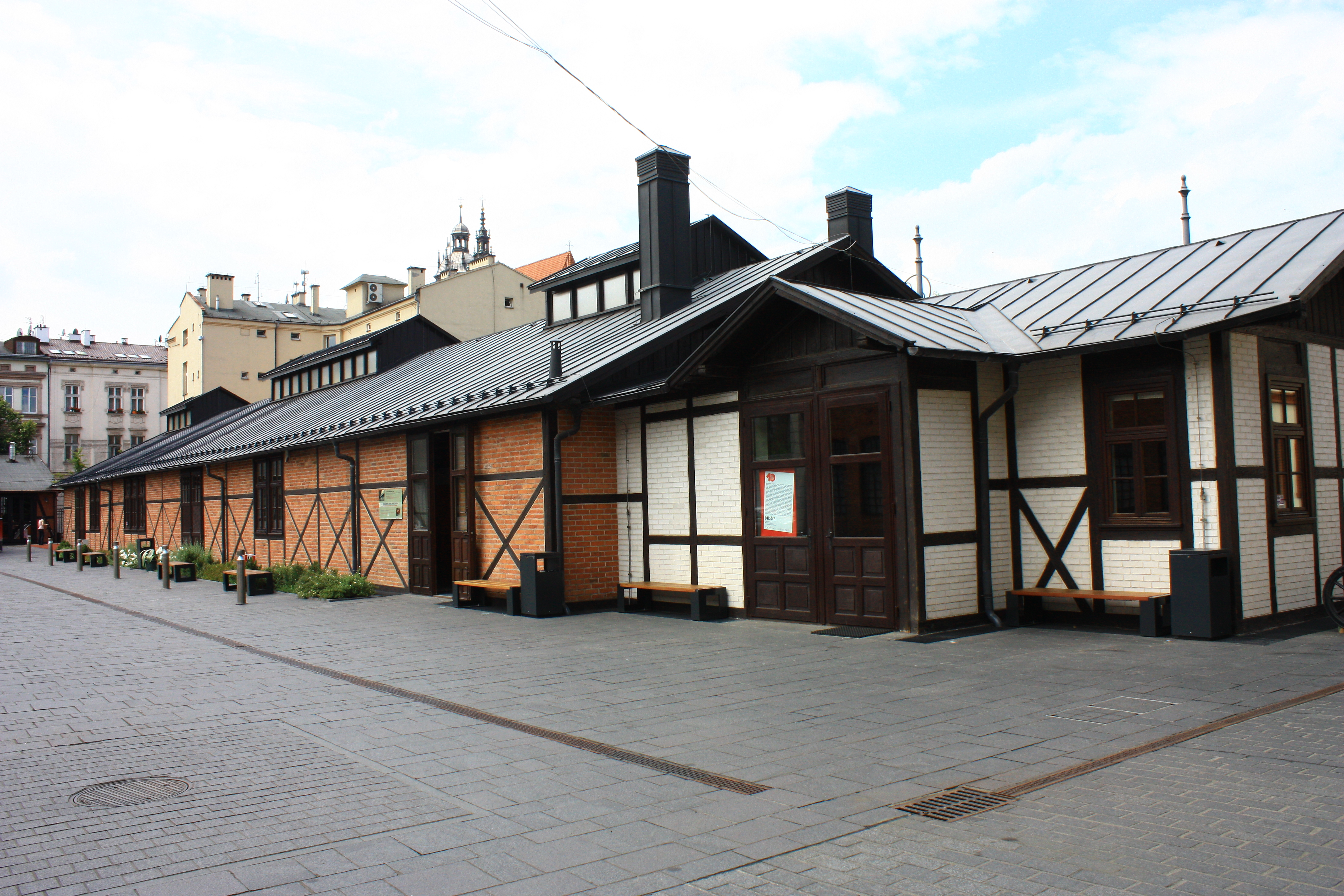 Kraków, stajnia tramwaju konnego I, 1892, 1900